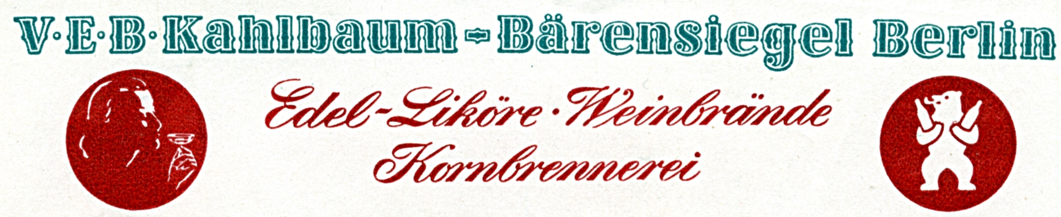 Briefkopf um 1964